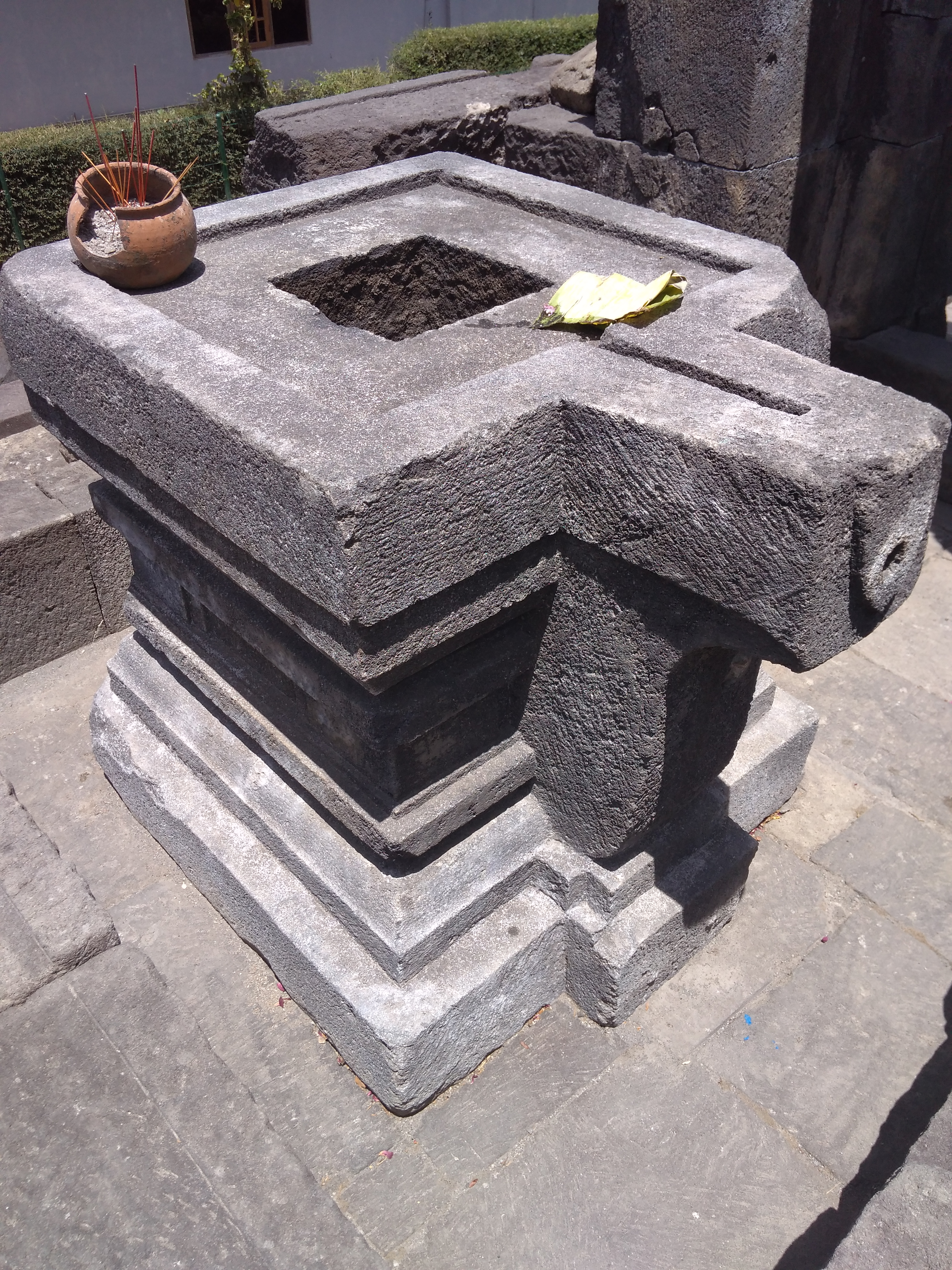 Yoni di Candi Lawang